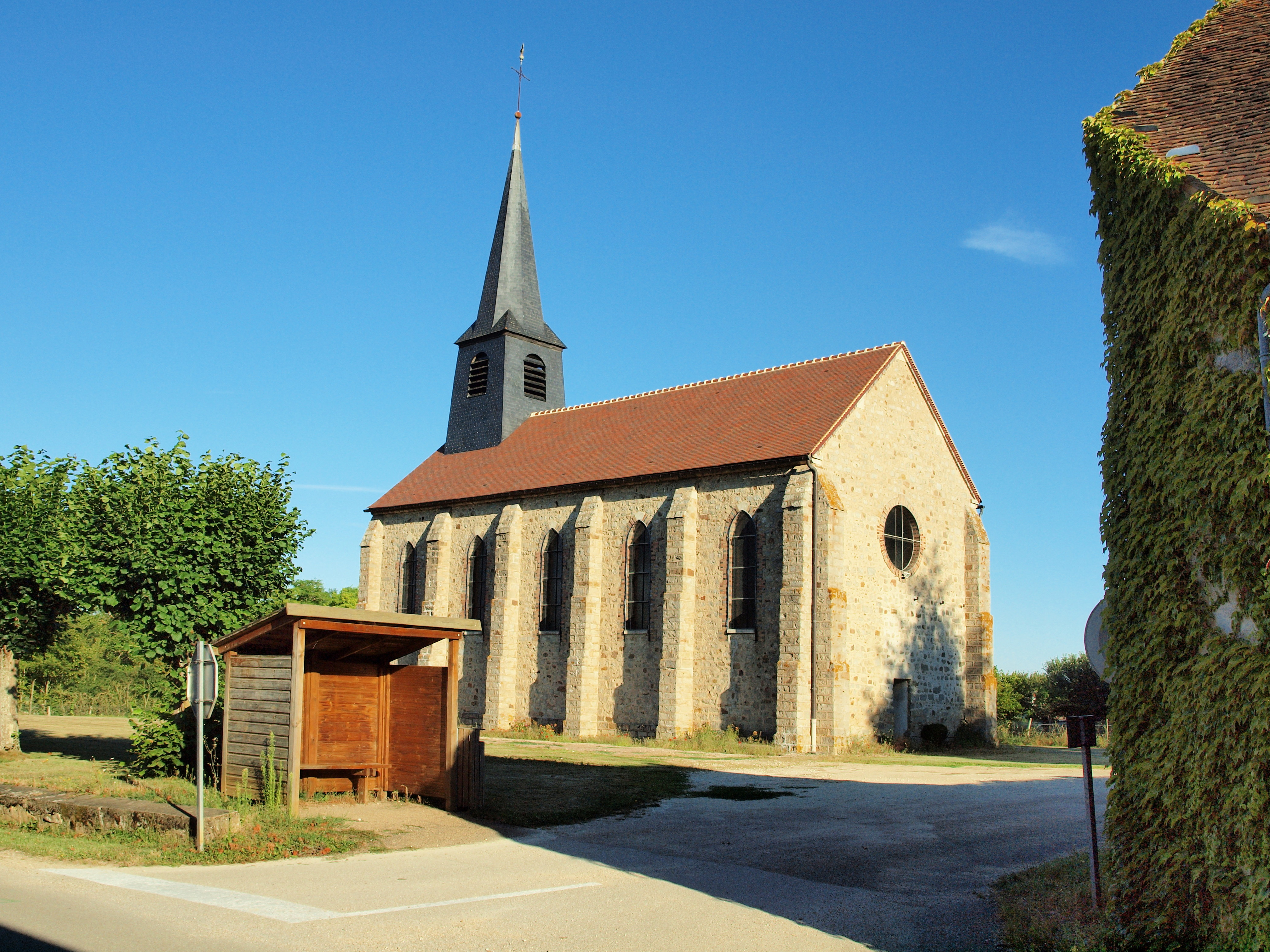 Fouchères (Yonne , France)